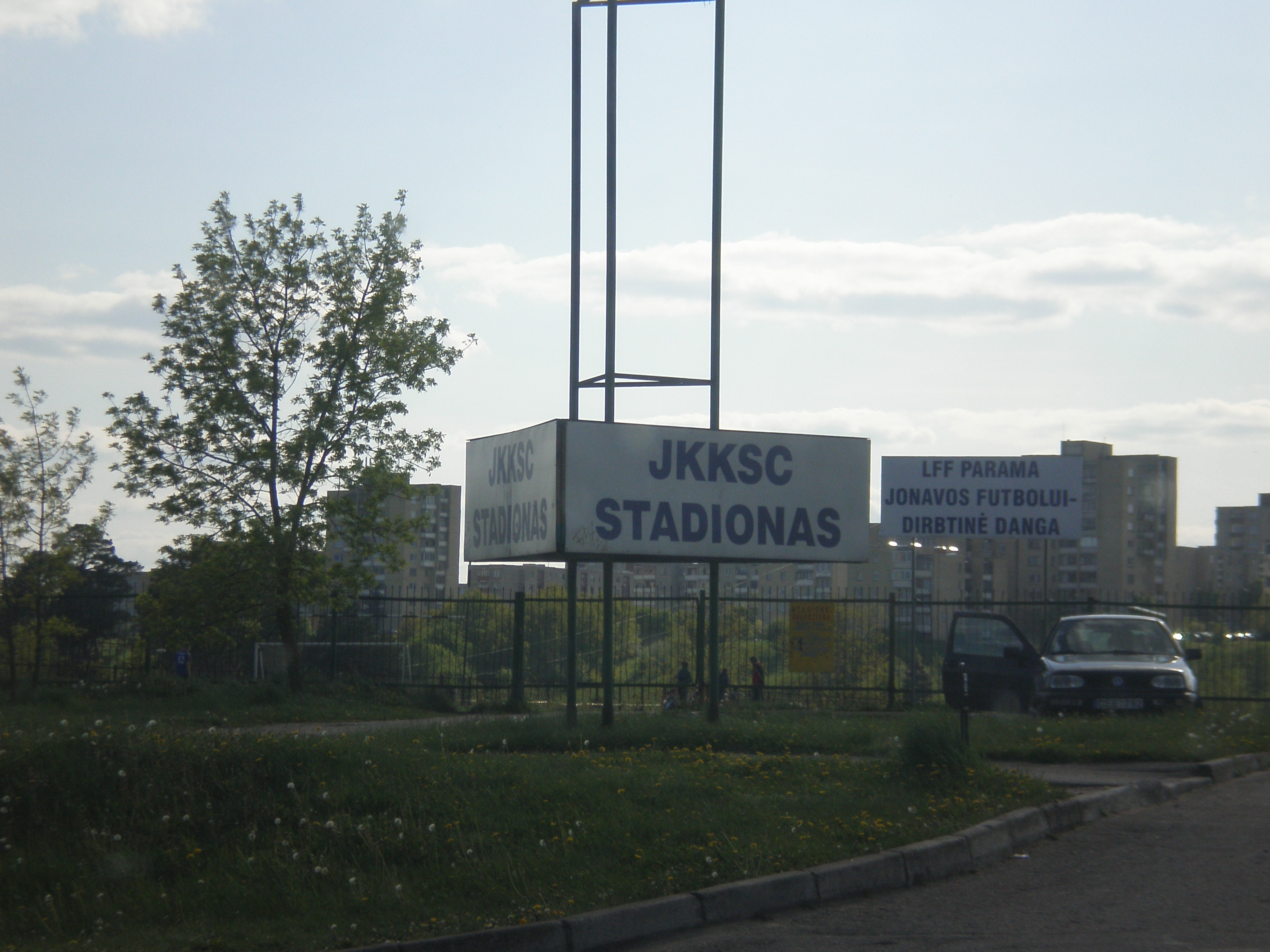 Jonavos Kūno Kultūros ir Sporto Centro Stadionas